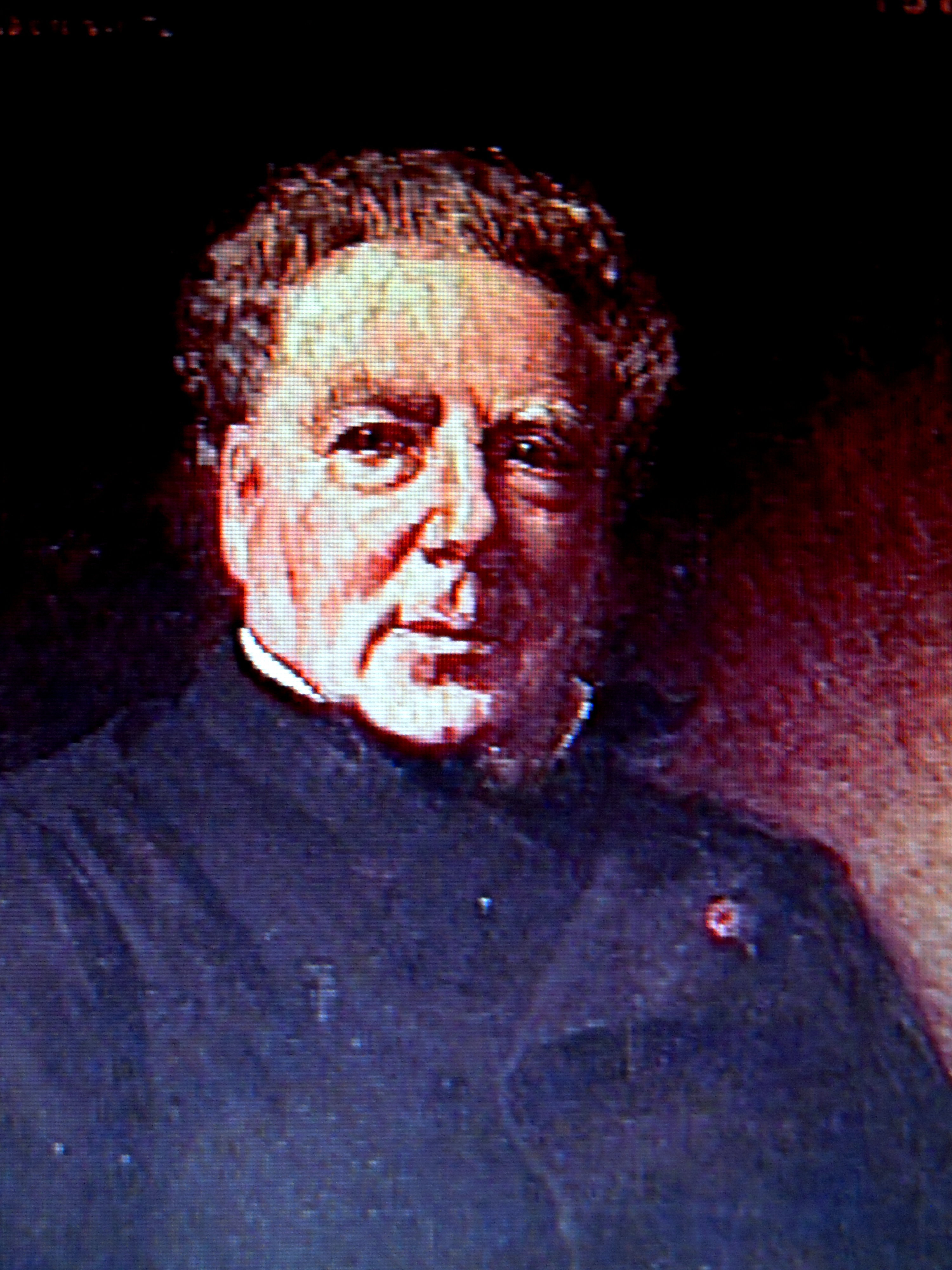 Portrait d'Auguste Caïn par Léon Bonnat (1833 - 1922)